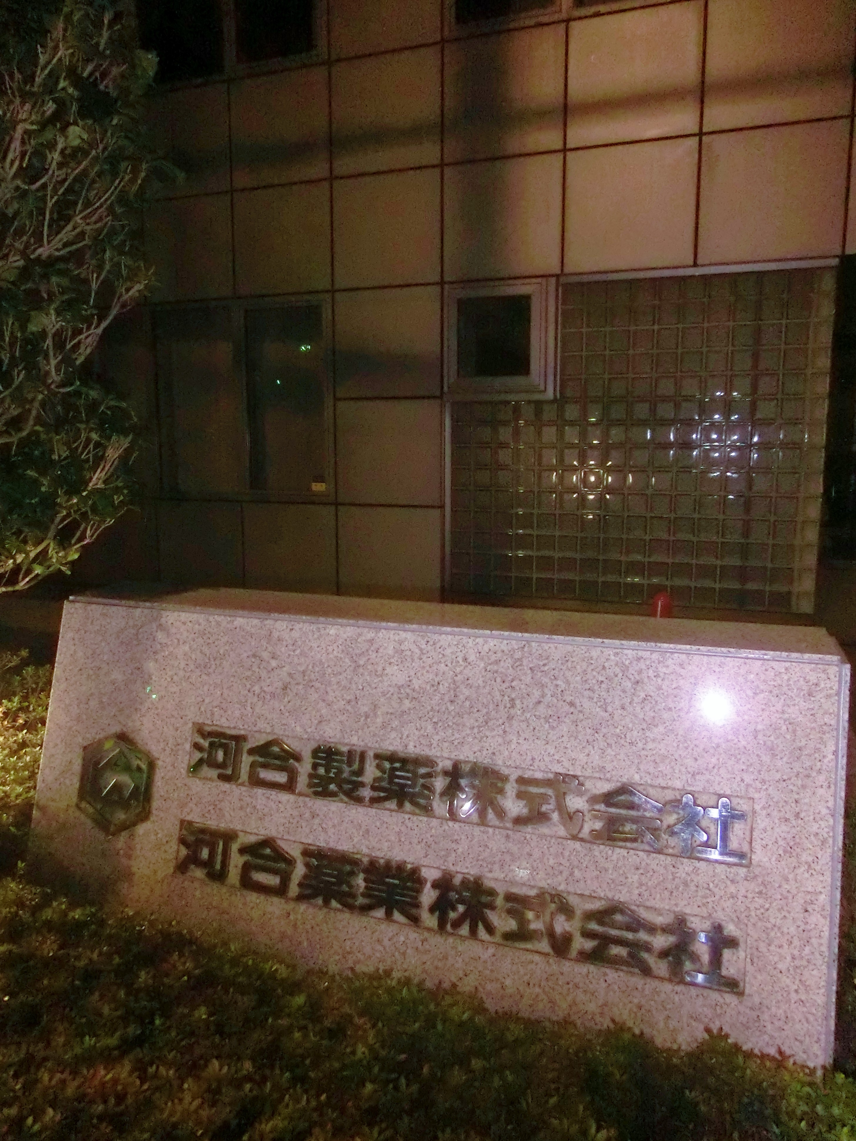 本社ビルの外観